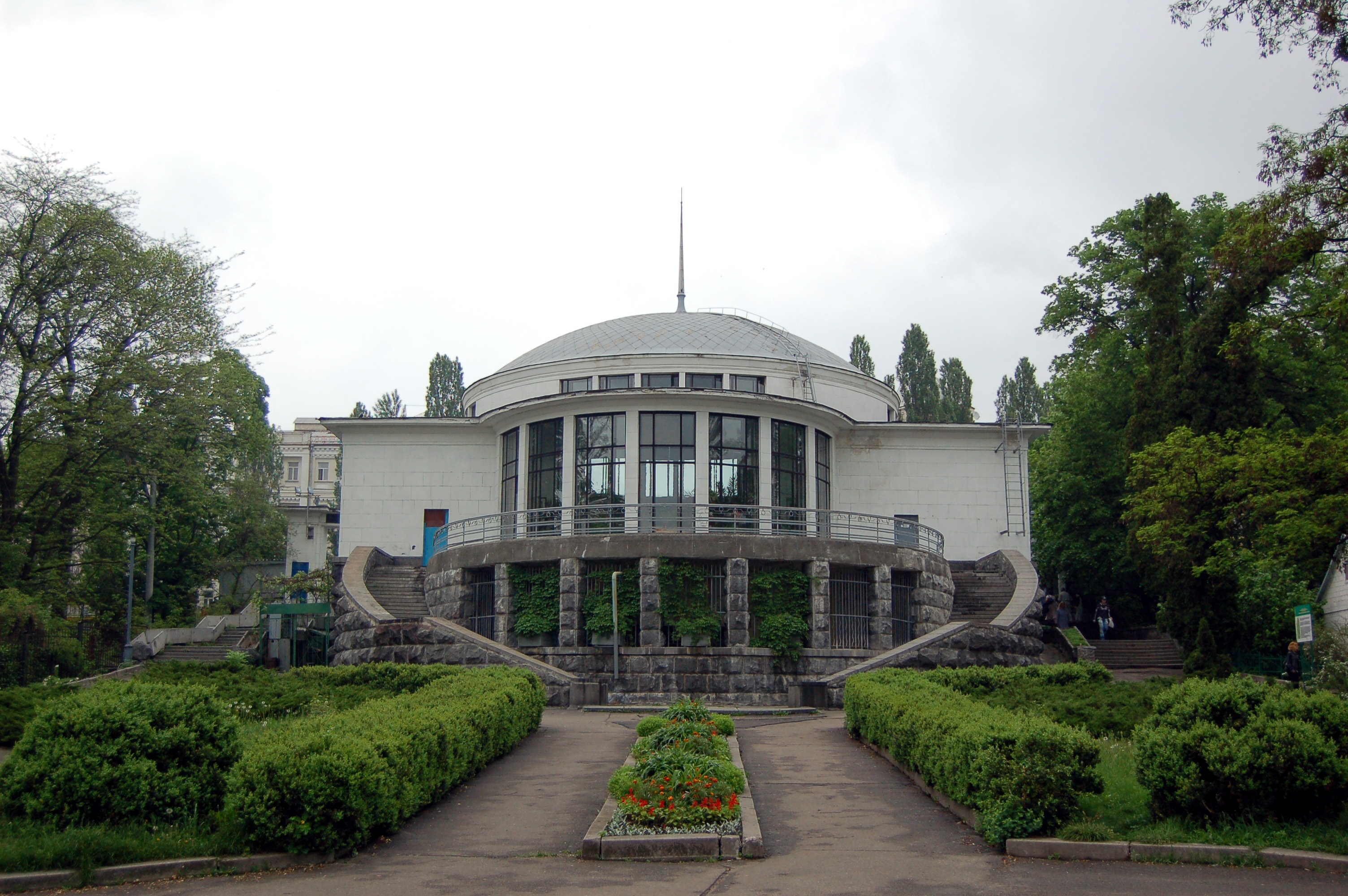 Станция метро «Университет», наземный вестибюль, вид из ботанического сада